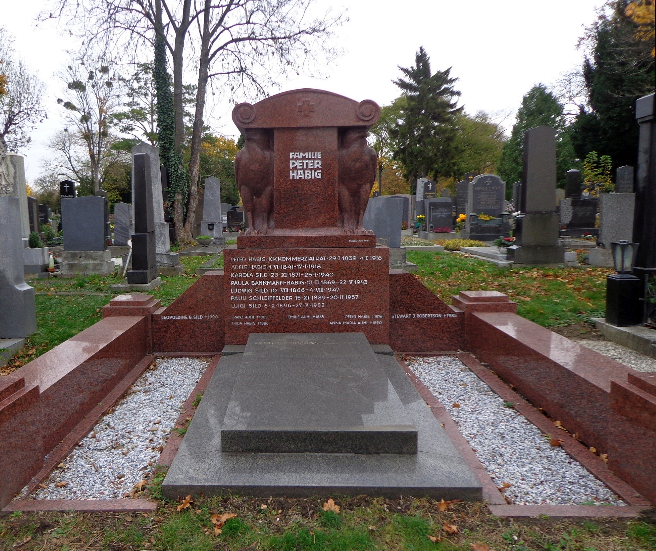 Wiener Zentralfriedhof - Gruppe 31B: Grab der Familie Peter Habig (1839–1916), gestaltet von Josef Engelhart